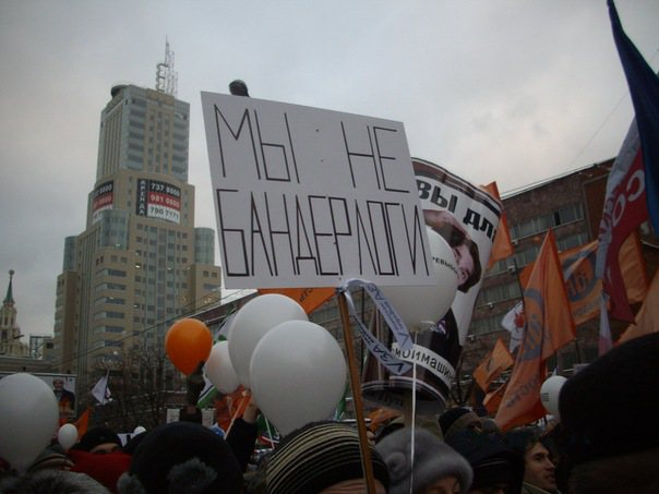 Фото с митинга на Сахарова. "Мы не бандерлоги!"